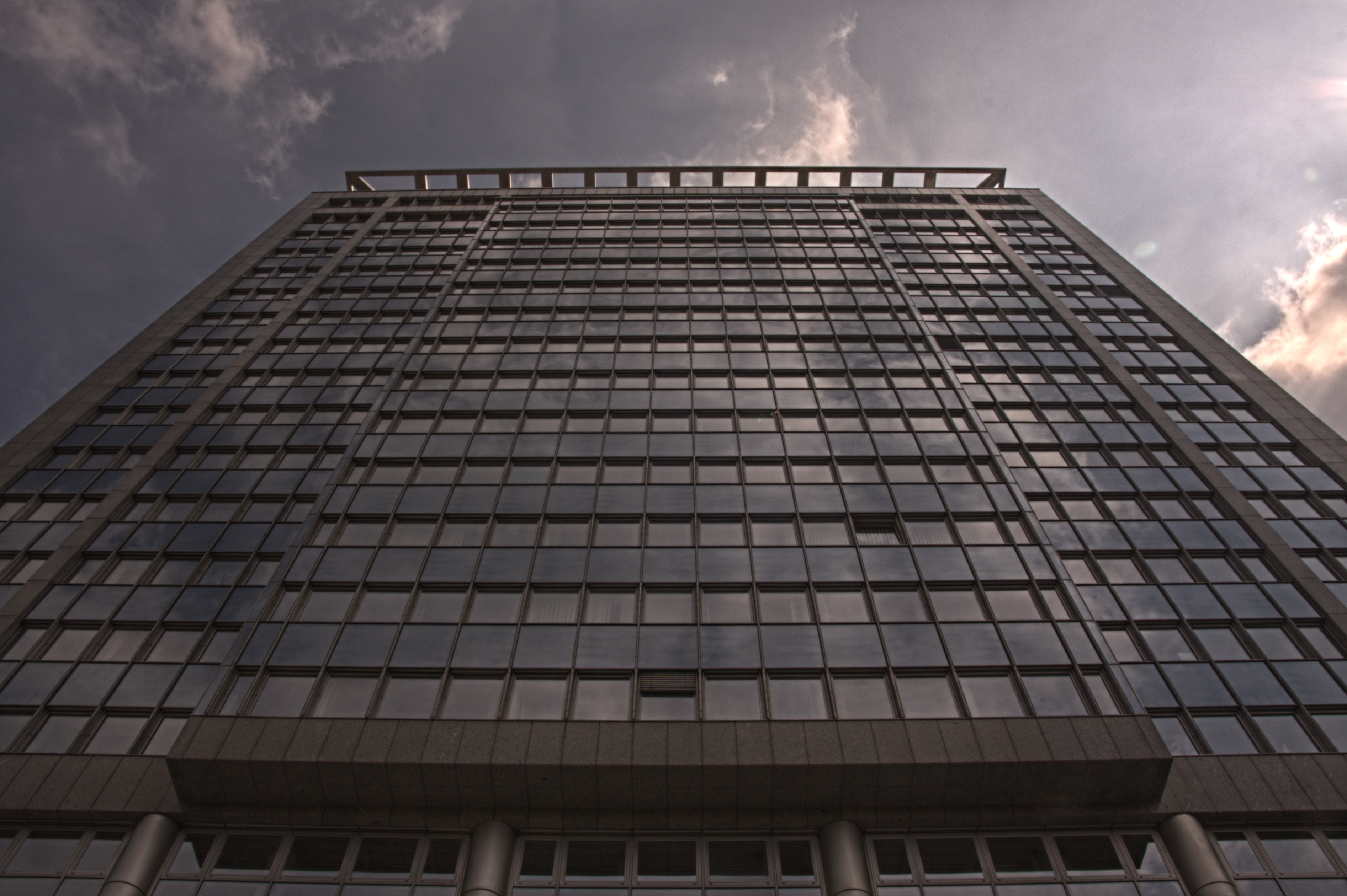 Das Evonik Hochhaus am Essener Hauptbahnhof